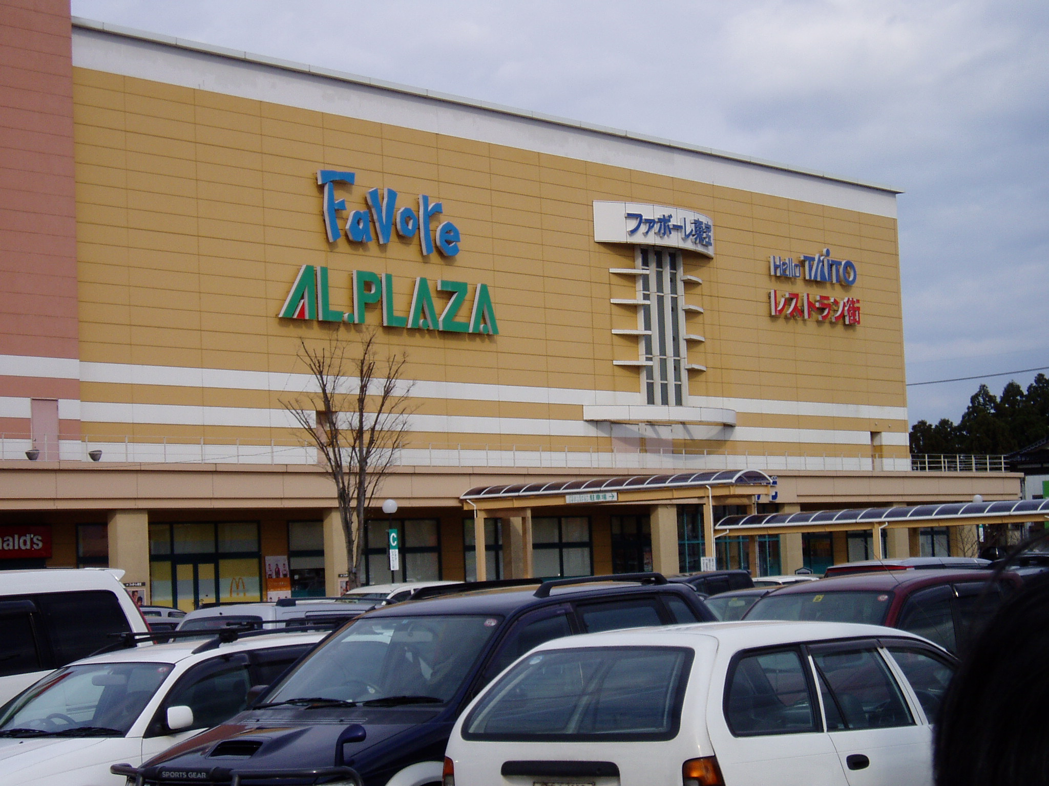 ファボーレの専門店街